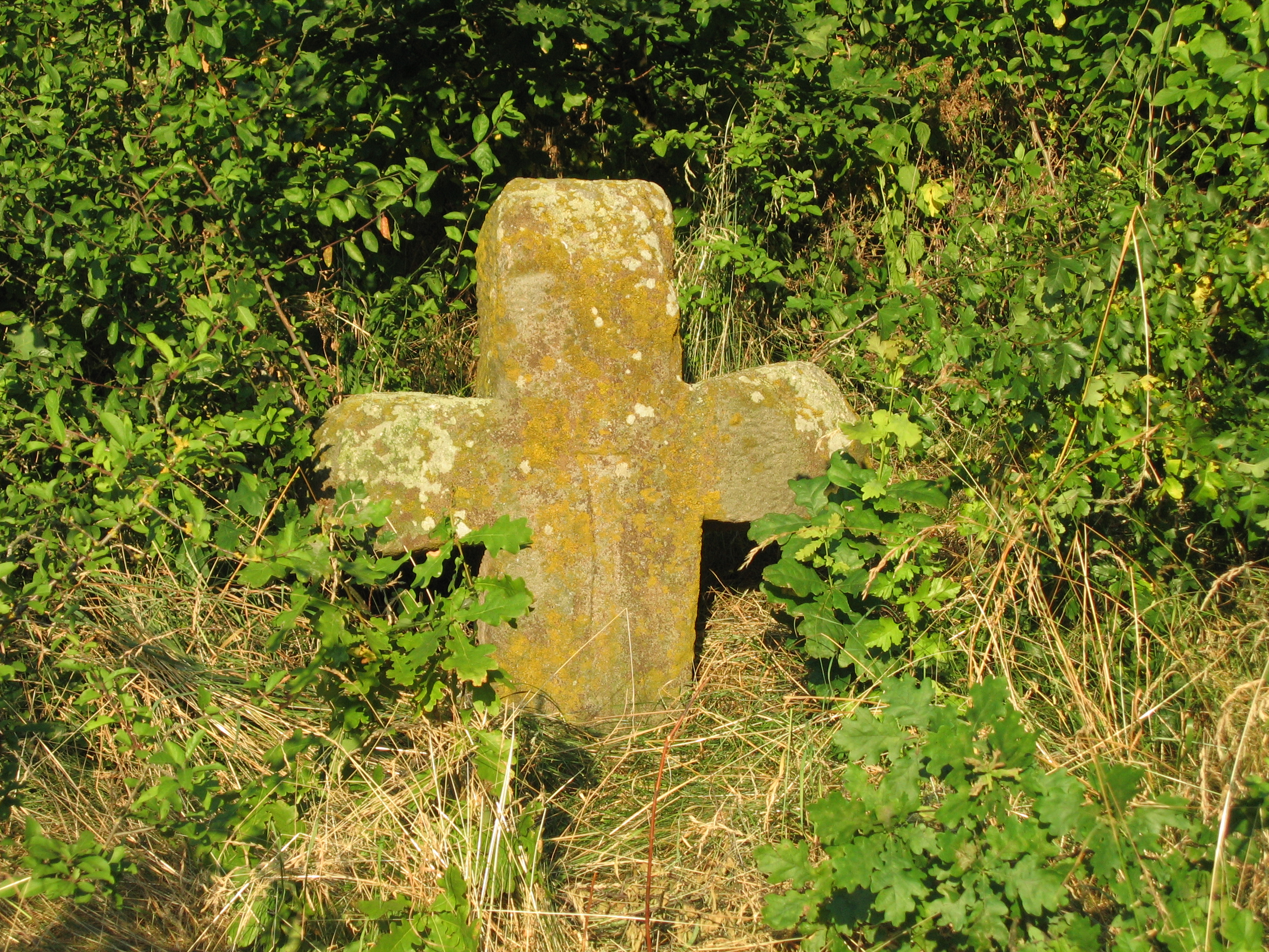 Steinkreuz, mittelalterl. in Lauterbach b.Geslau/Mfr.